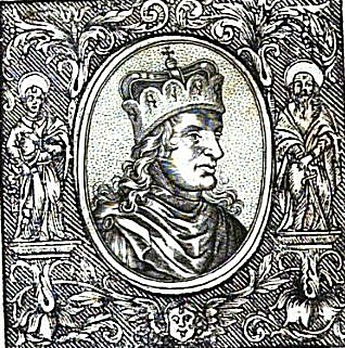 Soběslav I.